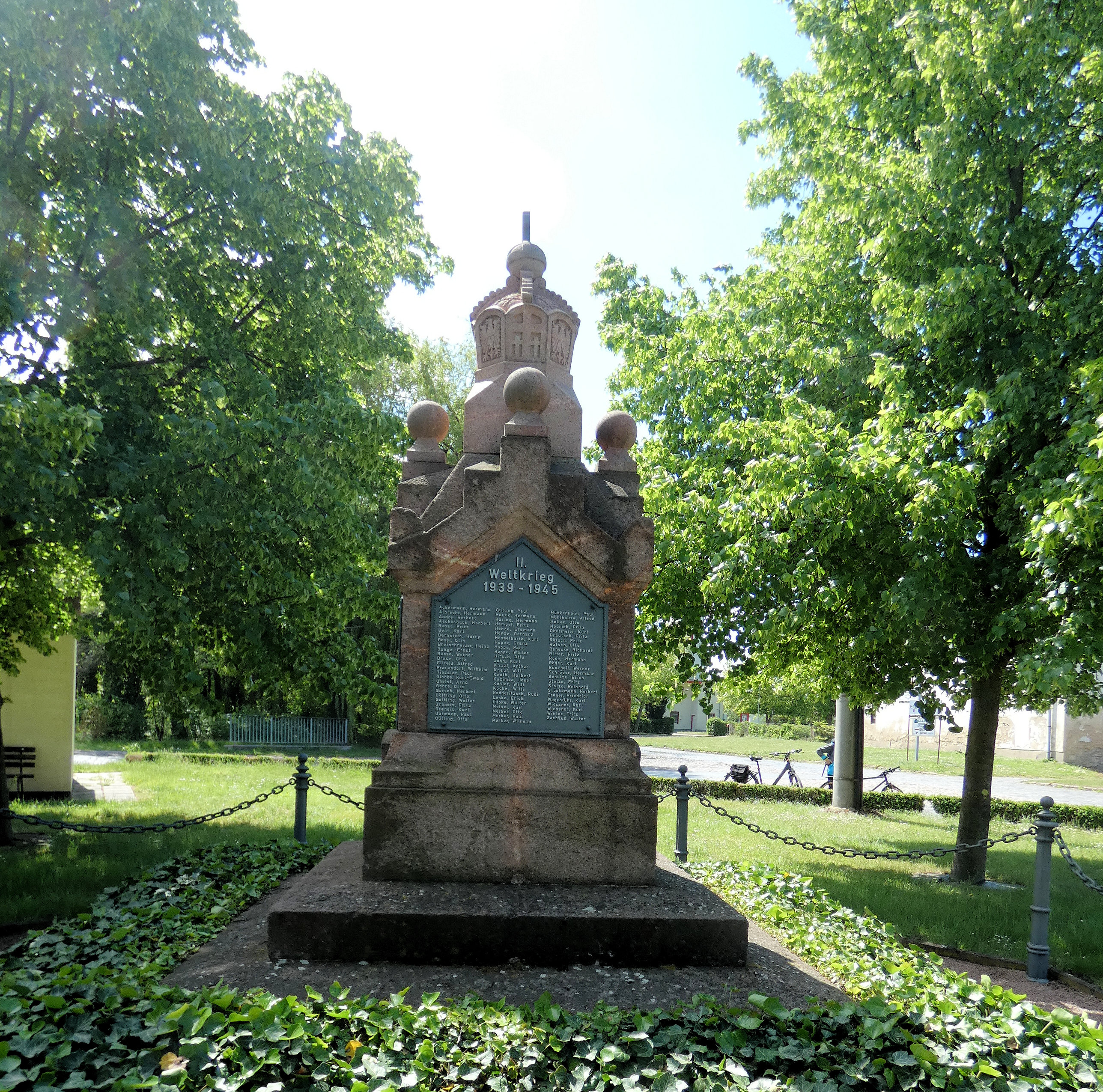 Kriegerdenkmal in Eisdorf (Teutschenthal)